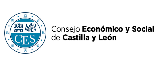 Logotipo oficial del Consejo Económico y Social de Castilla y León.